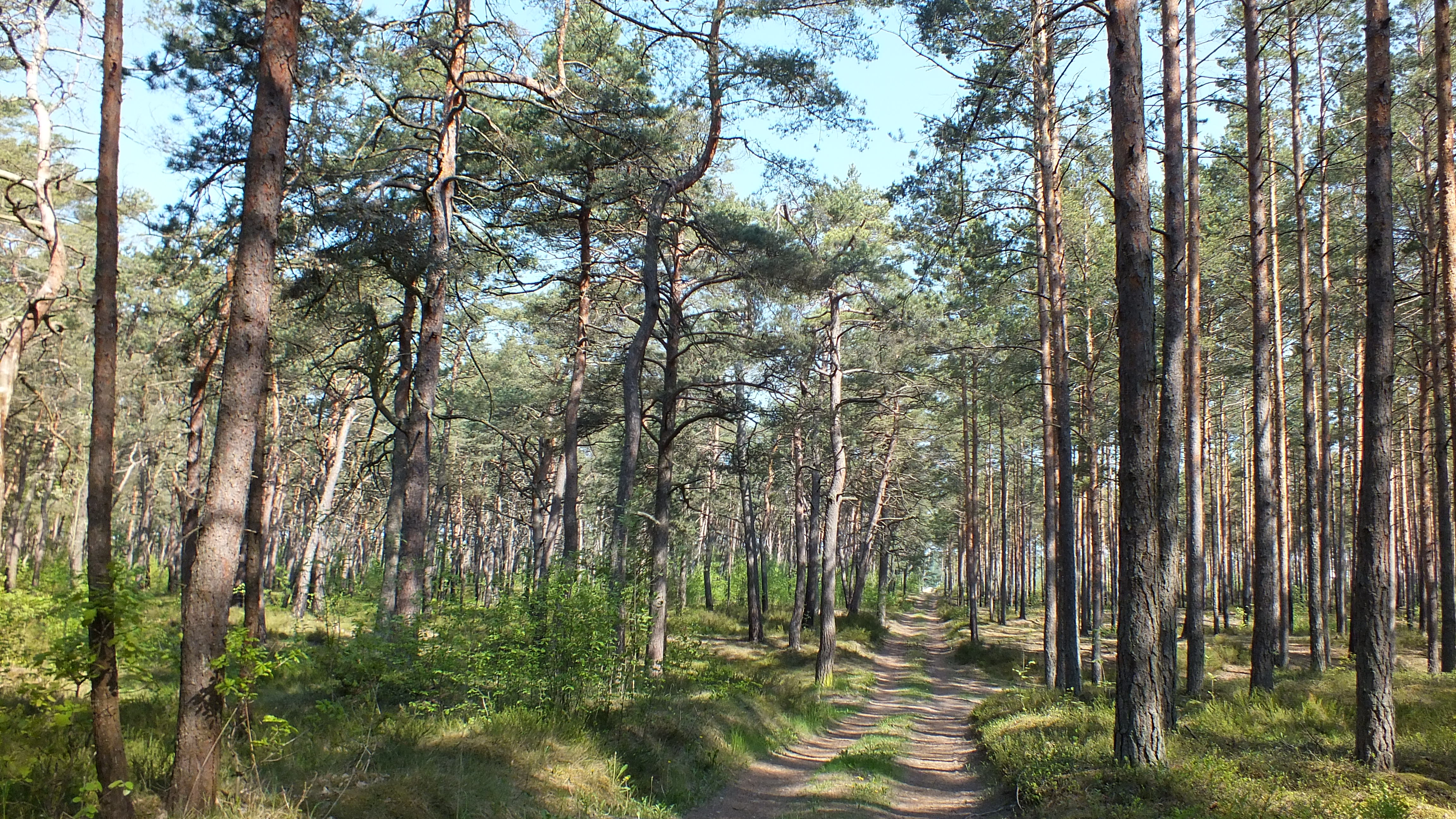 Darmštates priežu audze